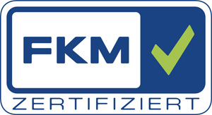 FKM Gesellschaft zur Freiwilligen Kontrolle von Messe- und Ausstellungszahlen